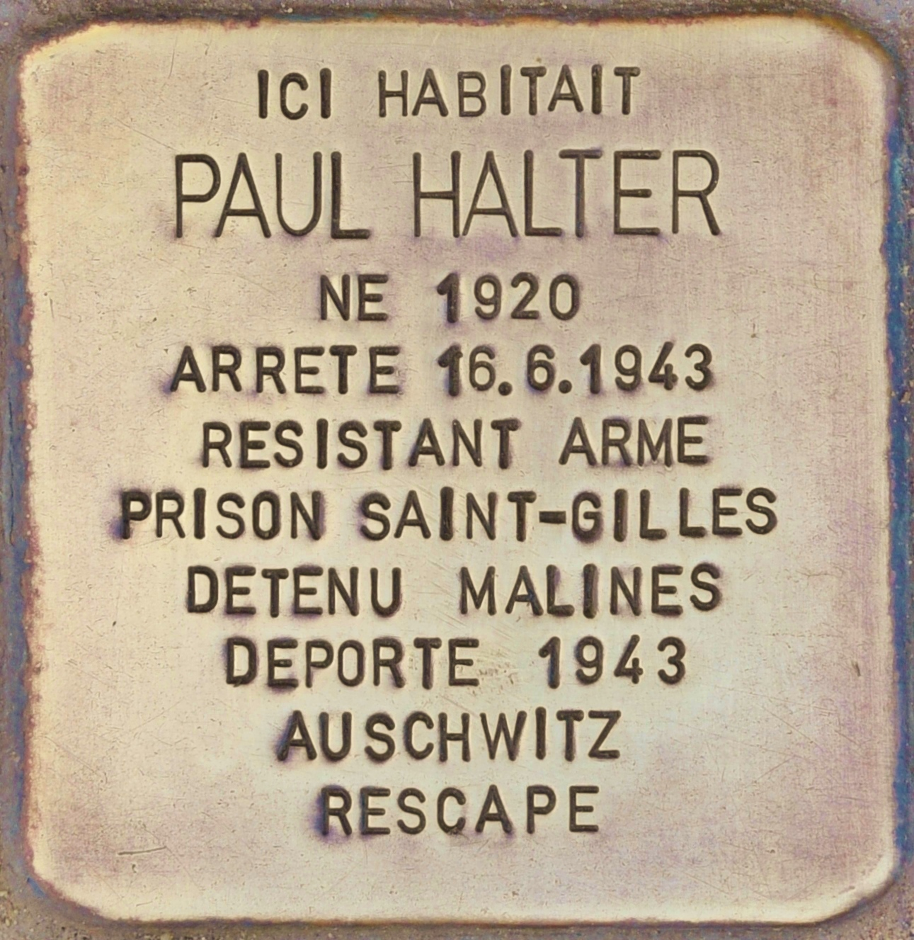 Stolperstein für Paul Halter